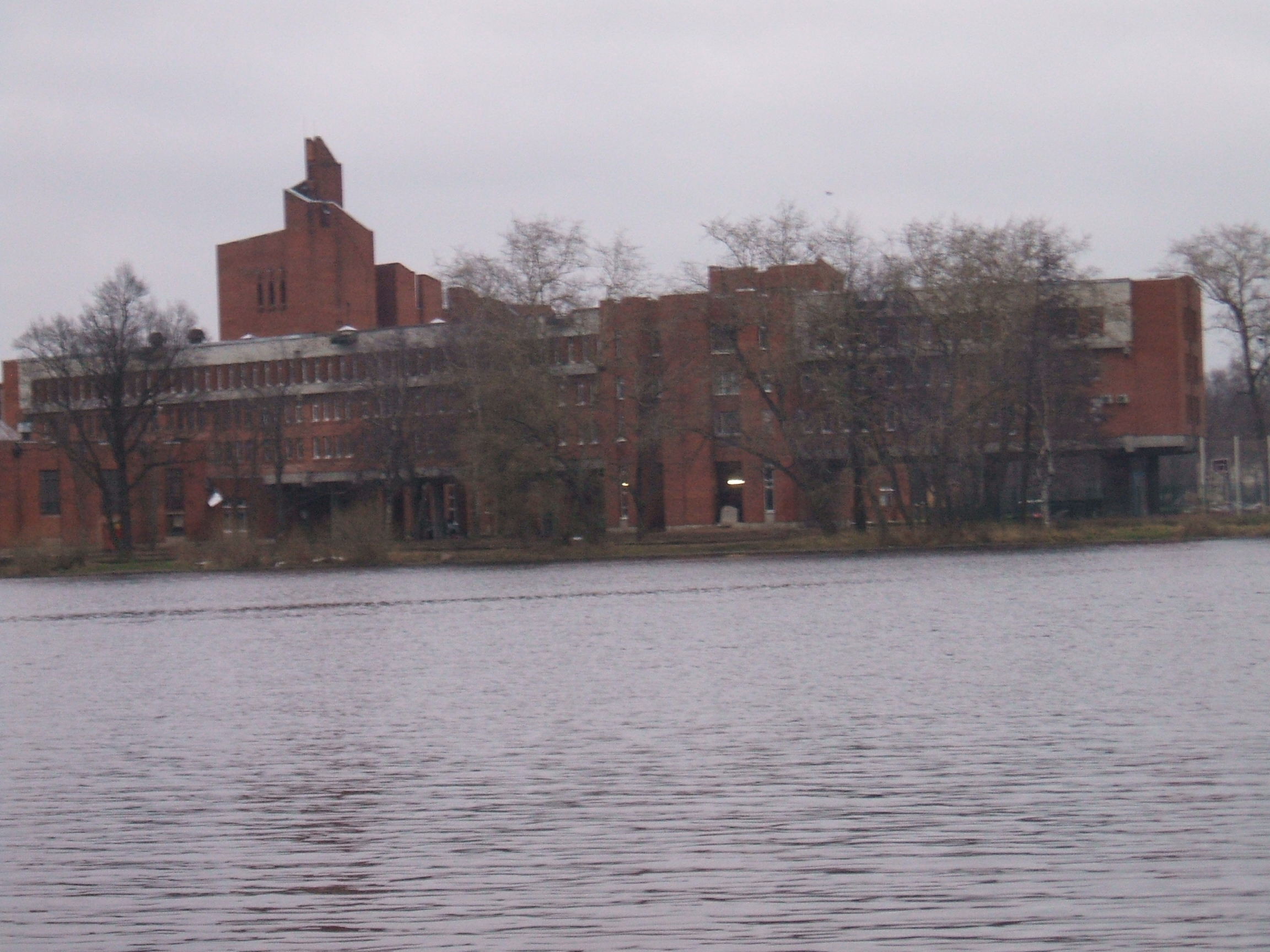 Самое глубокое место на Сестрорецком Разливе 5,5м.